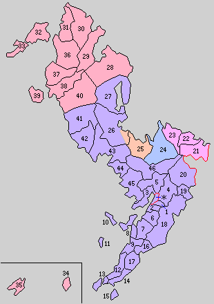 長崎県西彼杵郡の町村制時点の町村。